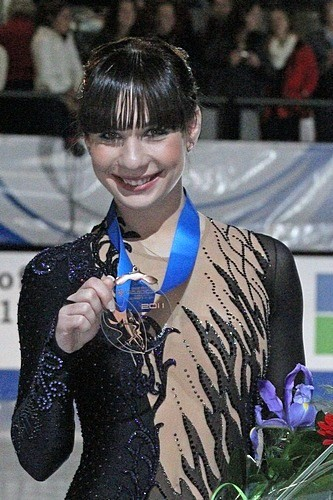 Алёна Леонова на подиуме финала Гран-при по фигурному катанию сезона 2011-2012